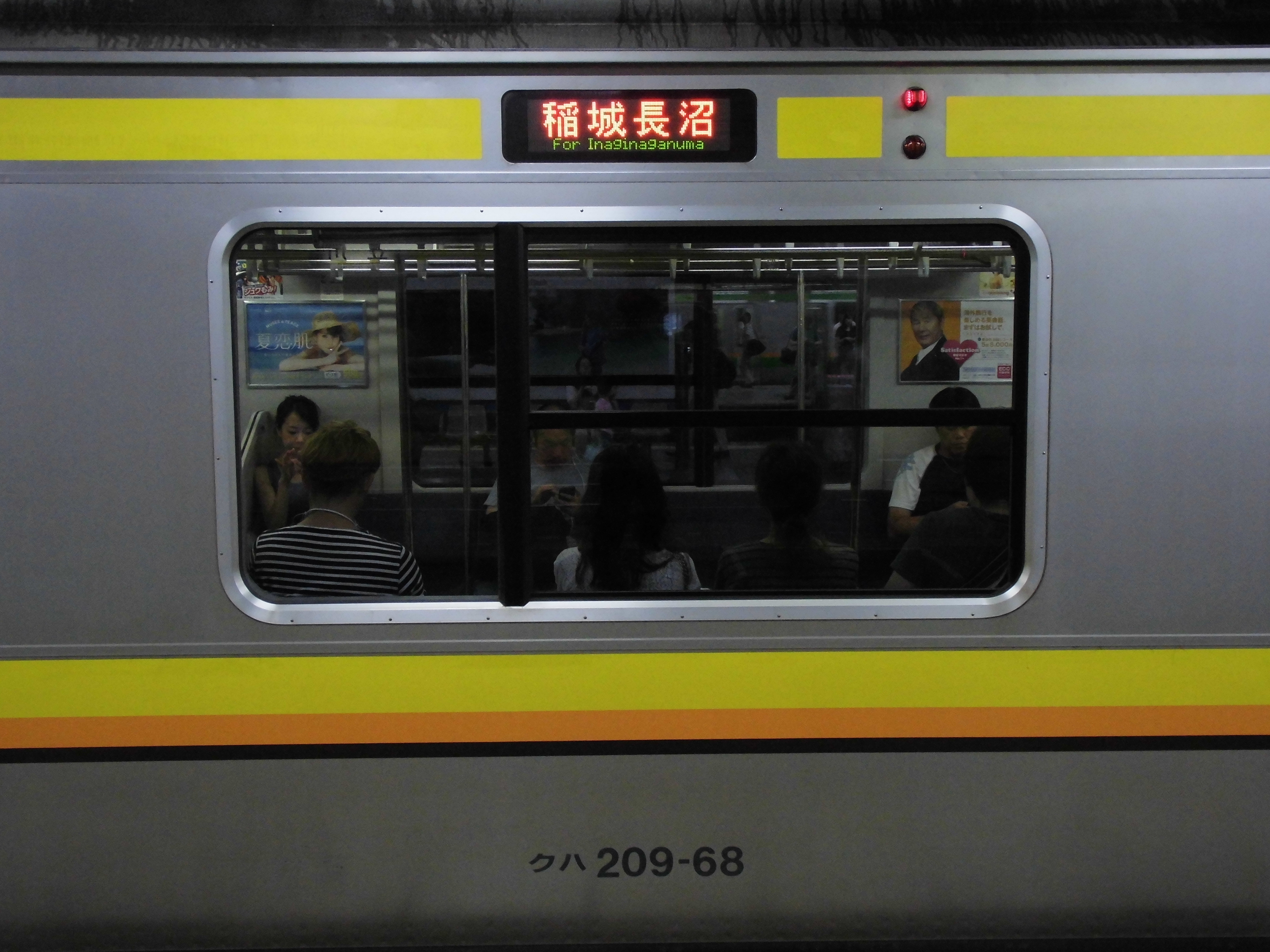 側面窓開閉化改造後の南武線ﾅﾊ32編成。